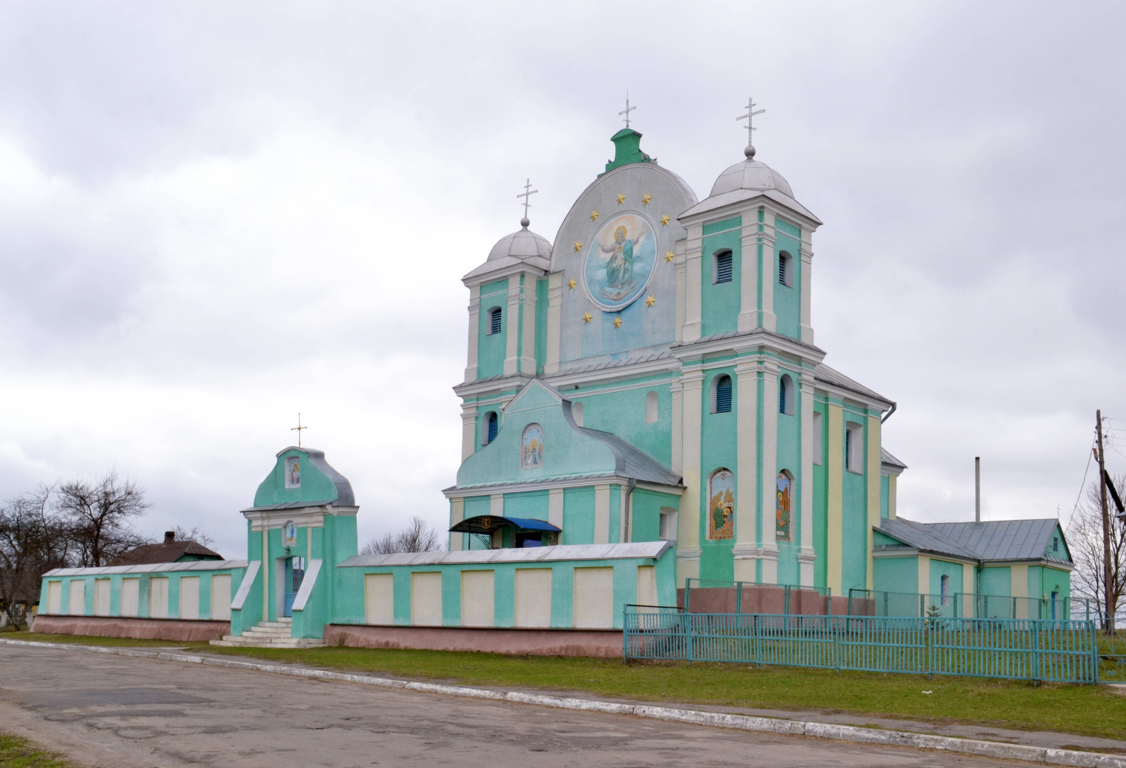 Успенська церква (мур.) (1751 рік) - вигляд з південного сходу - Радехів Любомльський район Волинська область Україна